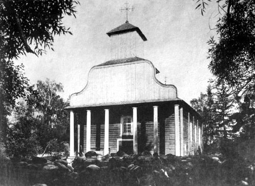 Беларуская (тарашкевіца): Беняконі (Bieniakoni). Стары касьцёл